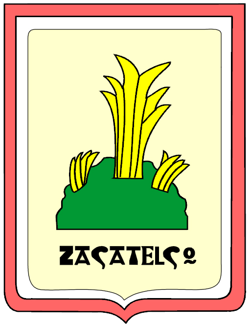 Escudo del municipio de Zacatelco